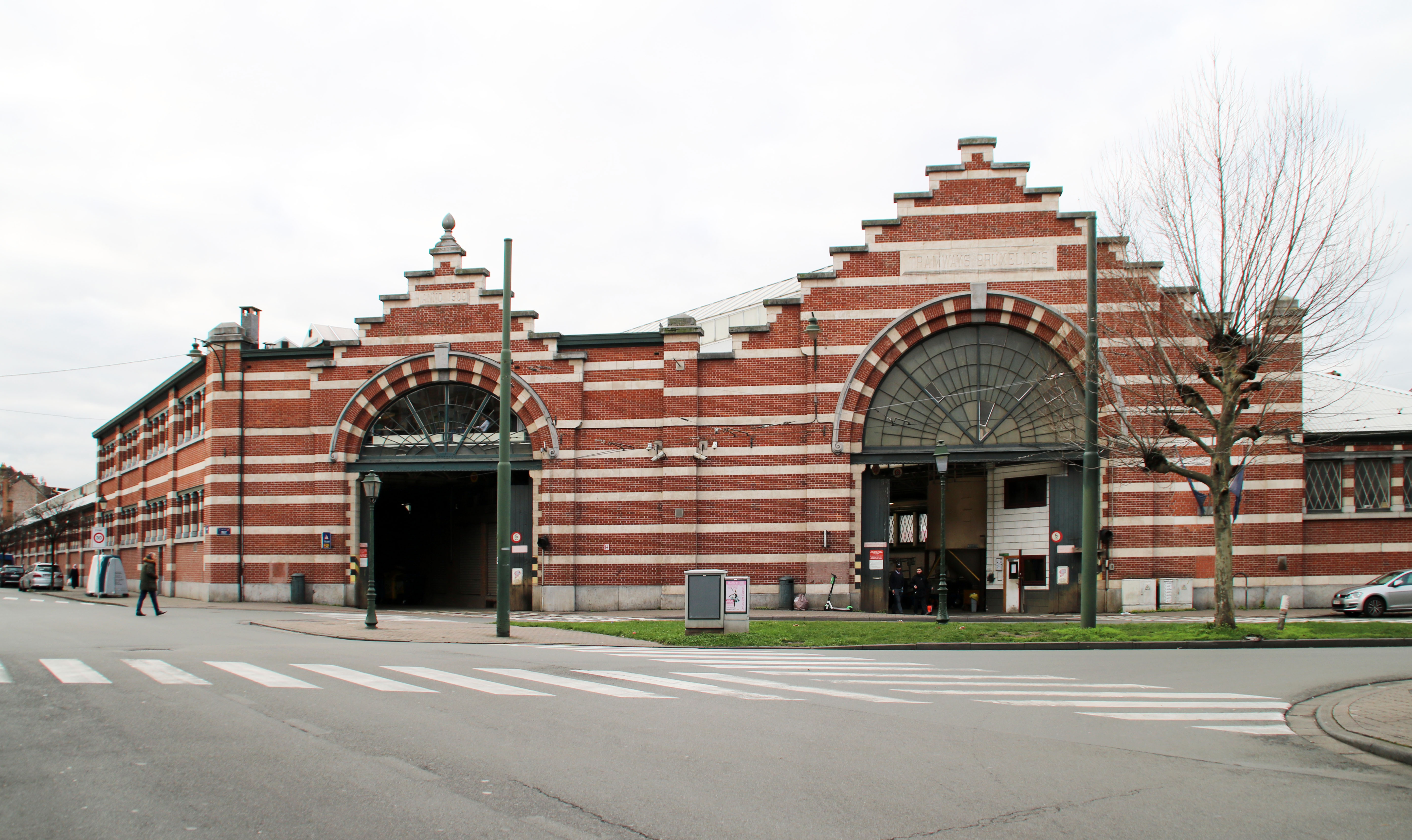 Dépôt des tramways bruexellois avenue du roi